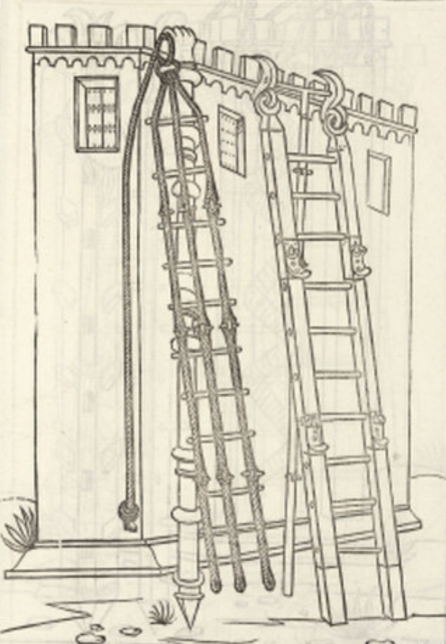 Zwei Sturmleitern. Darstellung aus einer 1534 in Paris erschienenen Ausgabe des Buches De Re Militari von Roberto Valturio